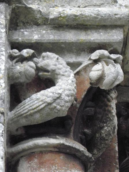 Chapiteau extérieur de l'ébrasement gauche du portail occidental. Église priorale Notre-Dame de l'Assomption de Voulton (77).